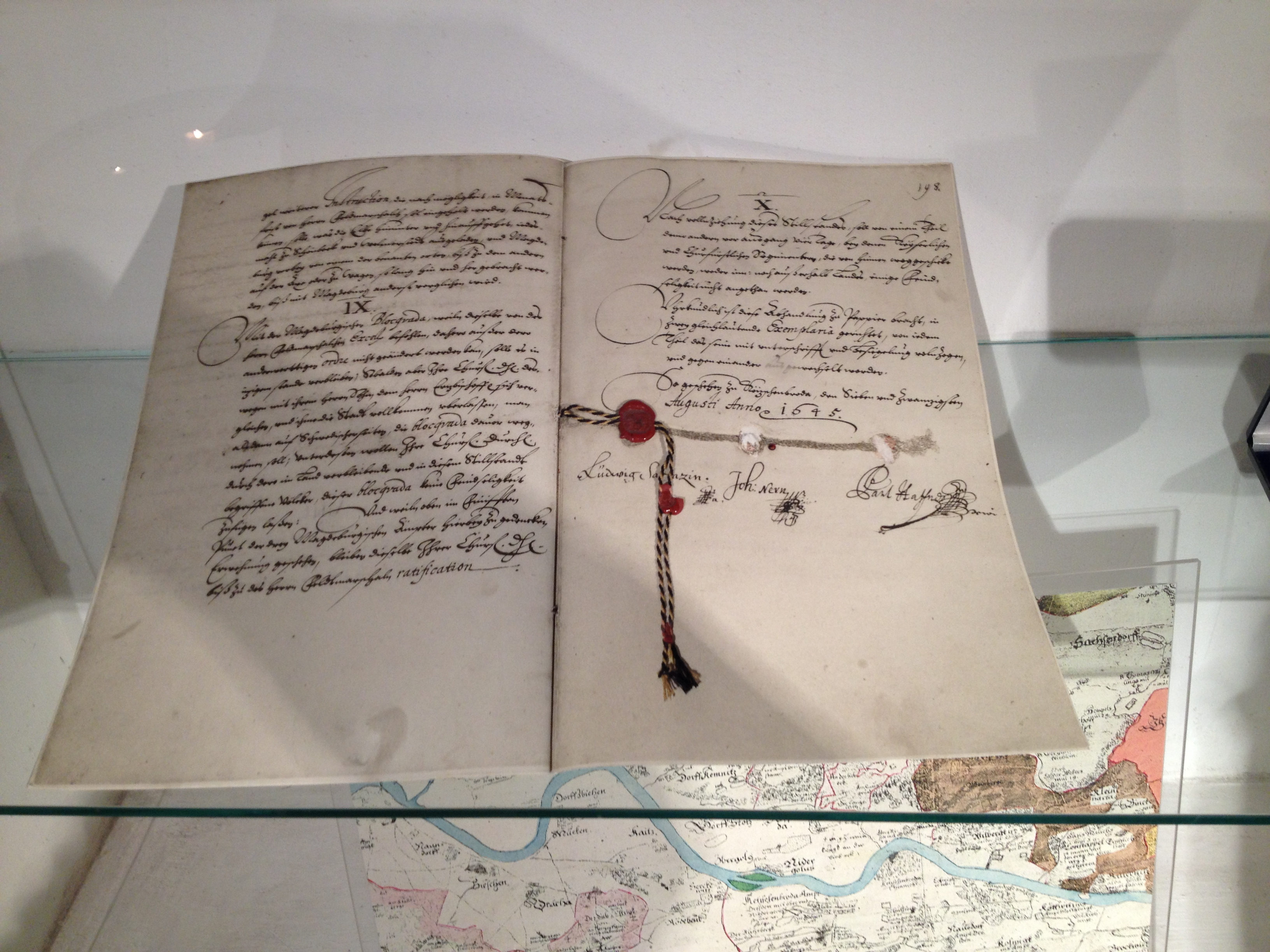 Friedenskirche zu Radebeul